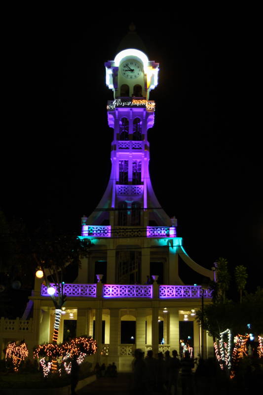 Emblema y orgullo de la ciudad que la alberga en su parque central del San Vicente, El Salvador. Iniciada en 1928 y finalizada en 1930, altura: 40 mts.